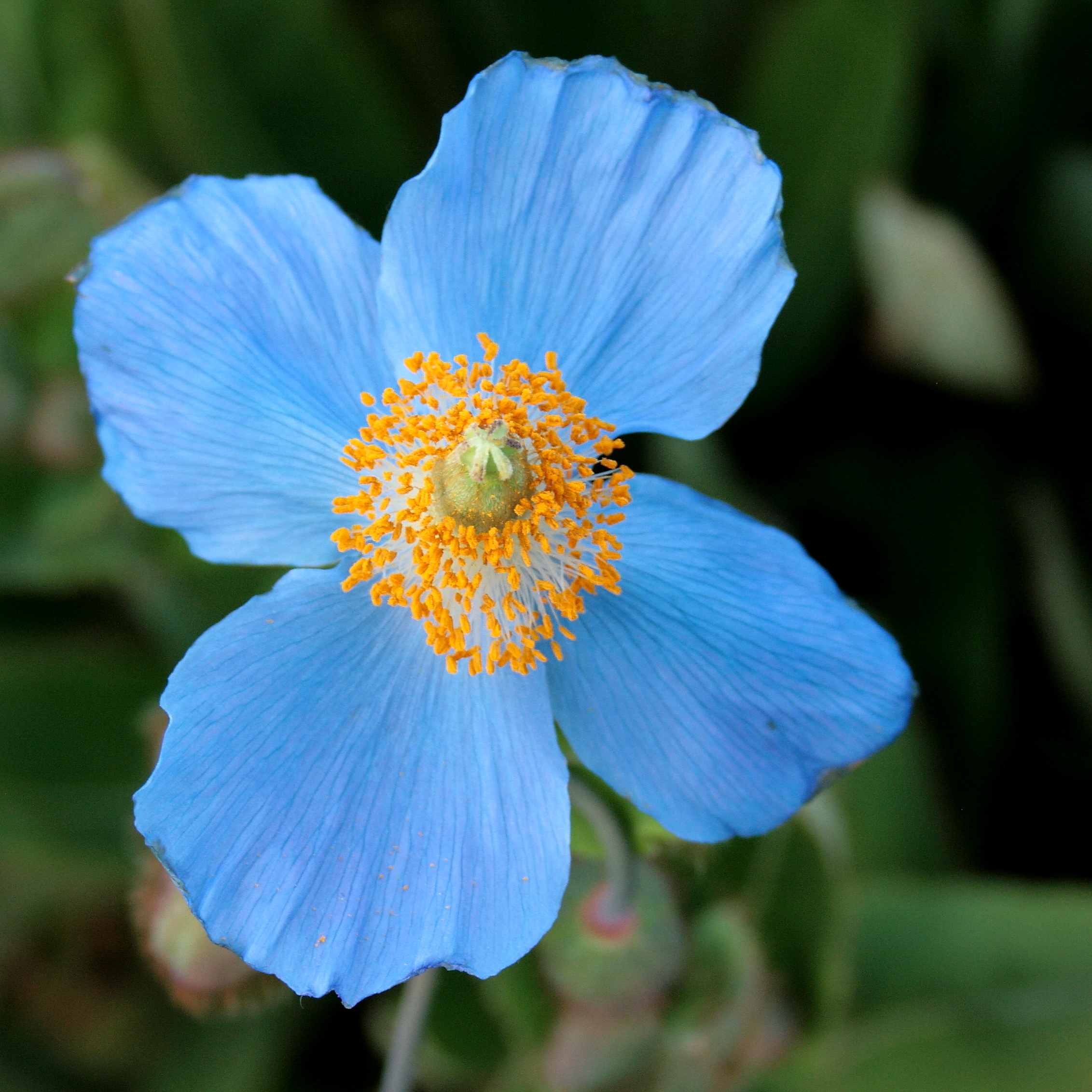 Ísland, Akureyri Botanical Gardens: Mohngewächs: Scheinmohn_(Meconopsis_betonicifolia)